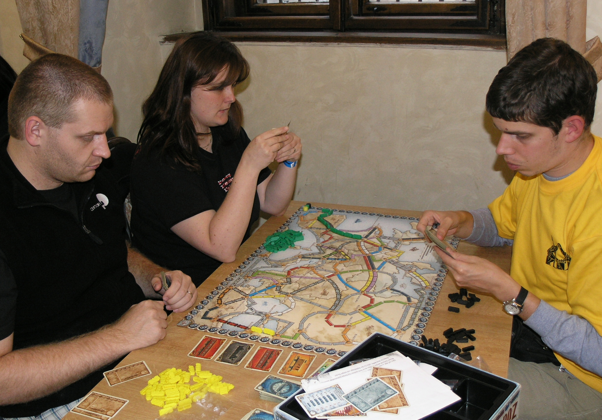 Deskohraní 2008